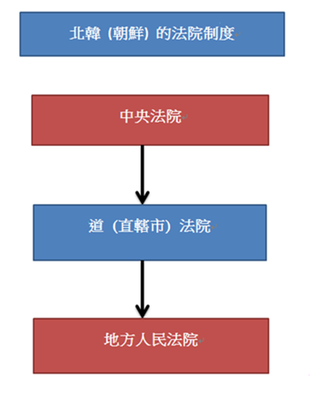 北韓法院制度表